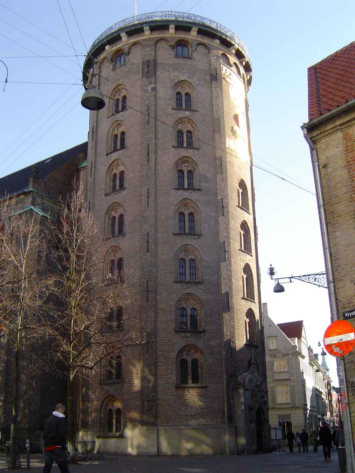 Danemark-Copenhague